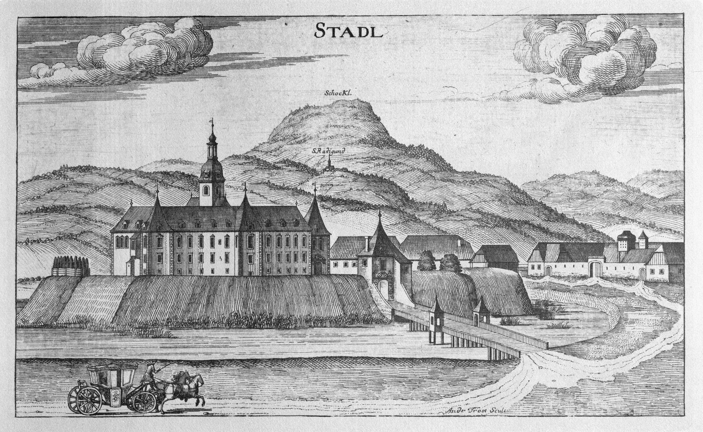 G. M. Vischers Käyserlichen Geographi, Topographia Ducatus Stiriae, Das ist: Eigentliche Delineation / und Abbildung aller Städte / Schlösser / Marcktfleck / Lustgärten / Probsteyen / Stiffter / Clöster und Kirchen / so es sich im Herzogthumb Steyrmarck befinden; Und anjetzo Umb einen billichen Preyß zu finden seynd Bey Johann Bitsch Universitäts Buchhandlern / Auff dem Juden=Platz bey der guldenen Saulen. Graz 1681 Die Nummerierung der Dateien folgt der alphabetischen Reihung der Ortsnamen und entspricht nicht dem Vischer-Register